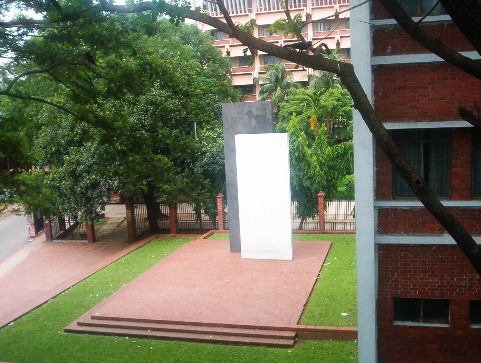 BUET Shahid Minar